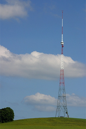 Antennenturm (215 m) Landessender Beromünster